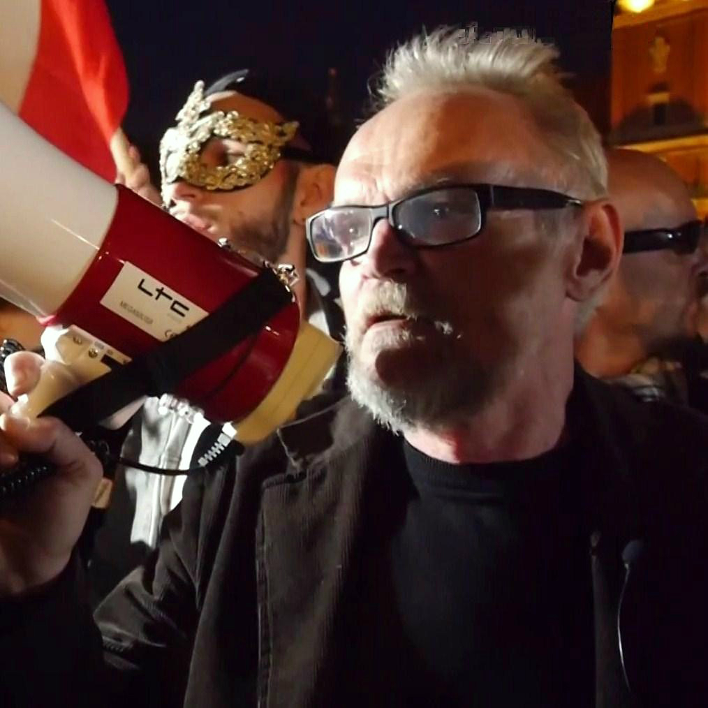 Paweł Kasprzak, filmowiec i działacz polityczny.